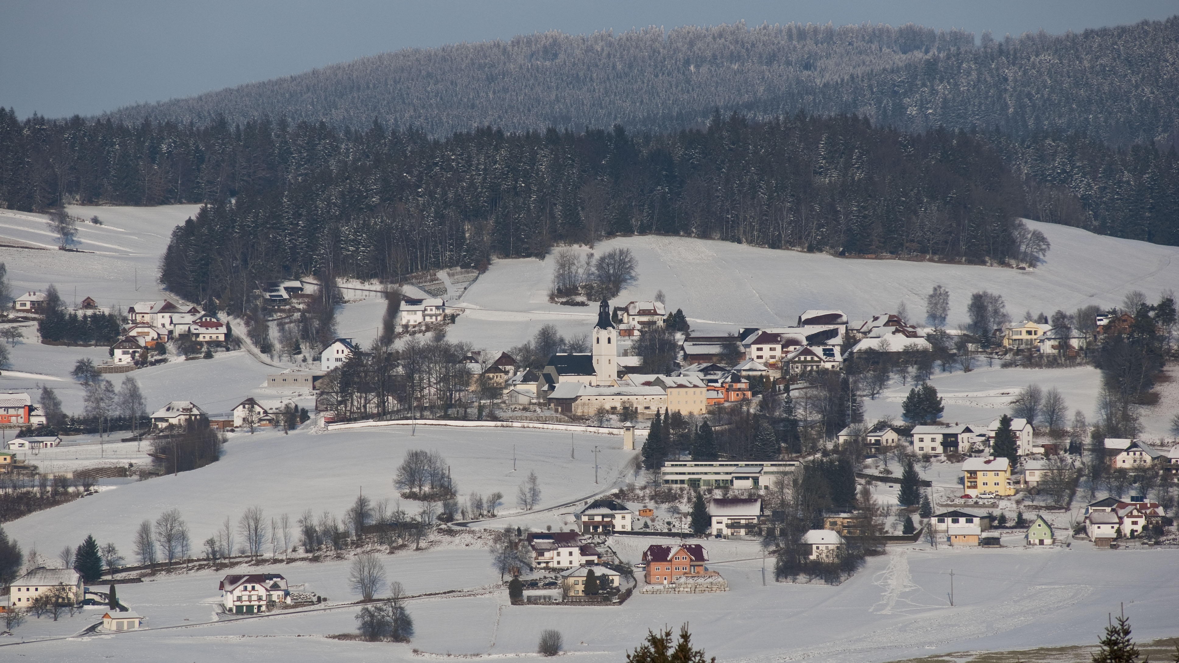 Sankt Oswald bei Haslach am 01.02.2009 von Südwesten gesehen. Aufgenommen vom Michaelsberg bei Obermärzing